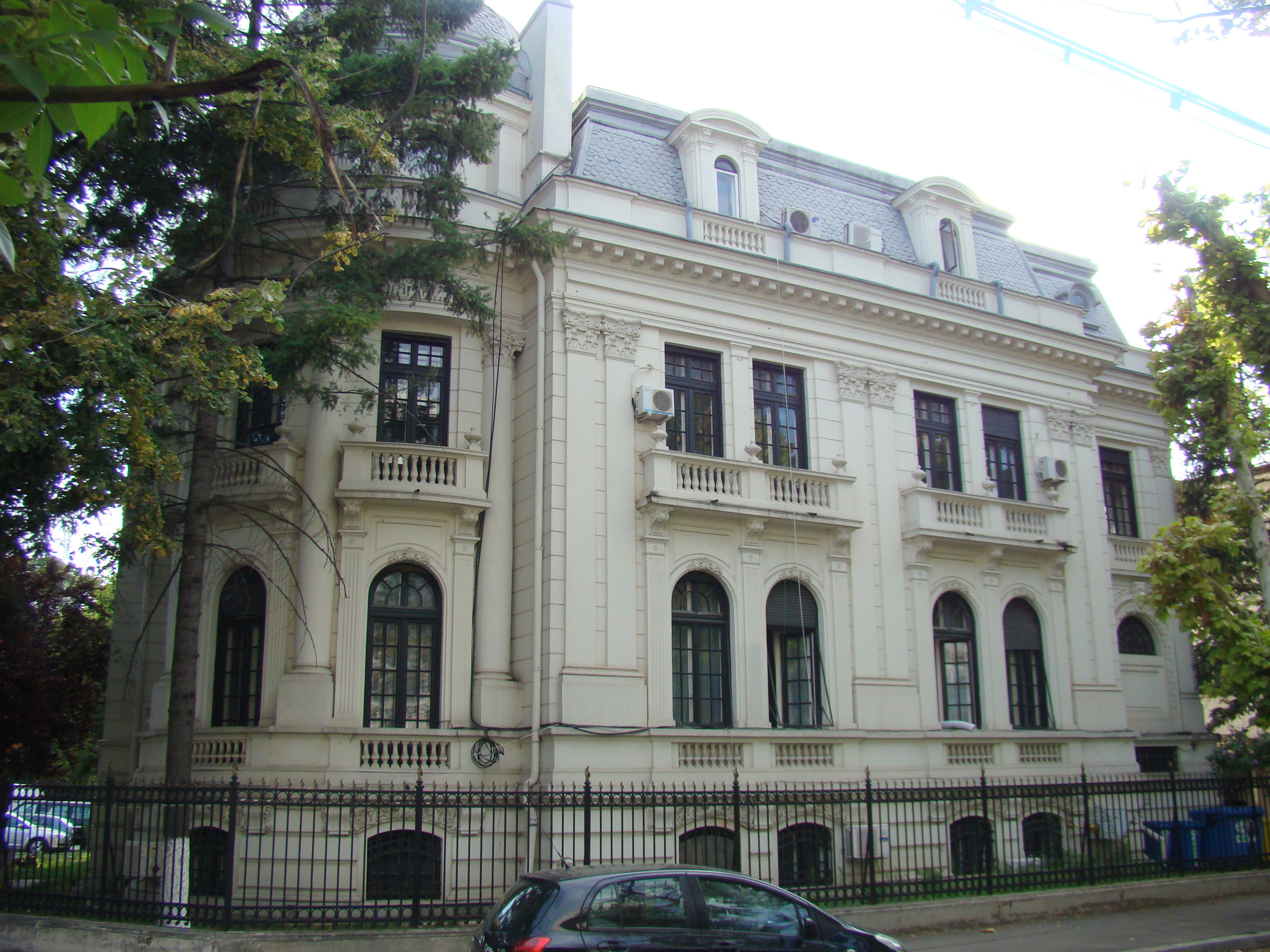 Casă monument istoric, str. Aleea Alexandru, nr. 33